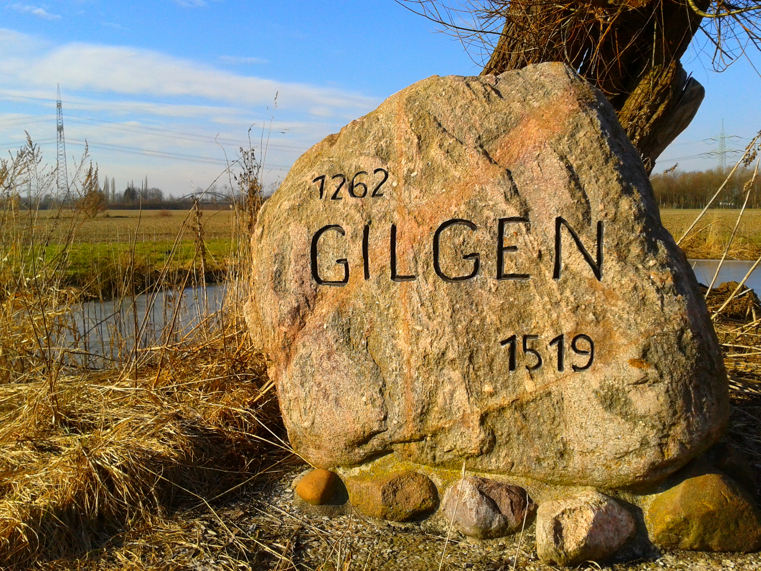 Weiterer Gedenkstein an das Dorf Gilgen, welches von 1262 bis 1519 im Bereich der heutigen Stadt Sehnde existierte